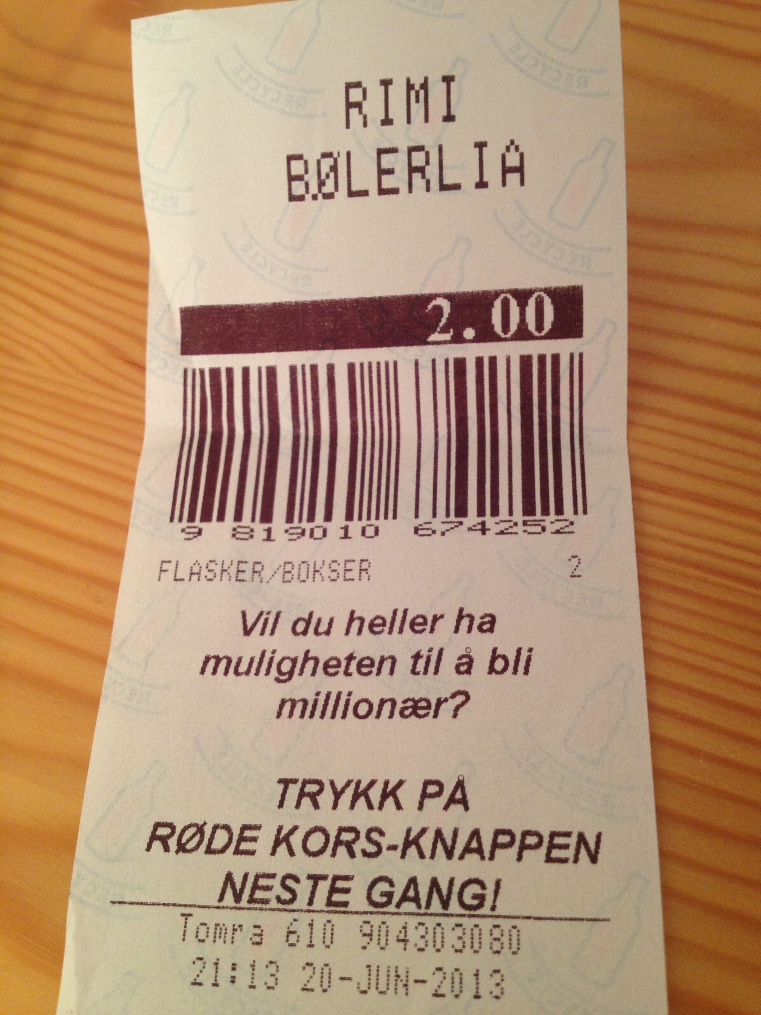 Pantelapp.